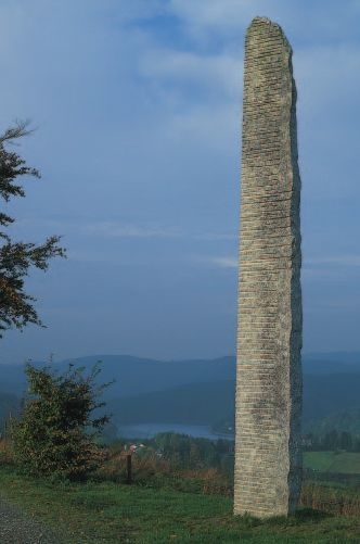 Sujet: "Jakobsleiter", Skulptur vum Bertrand Ney (L) - Granit aus Ostdeutschland, Skulpturewee zu LÃ«lz - lb:1999 Auteur: Raymond Clement Source: Naturpark Uewersauer